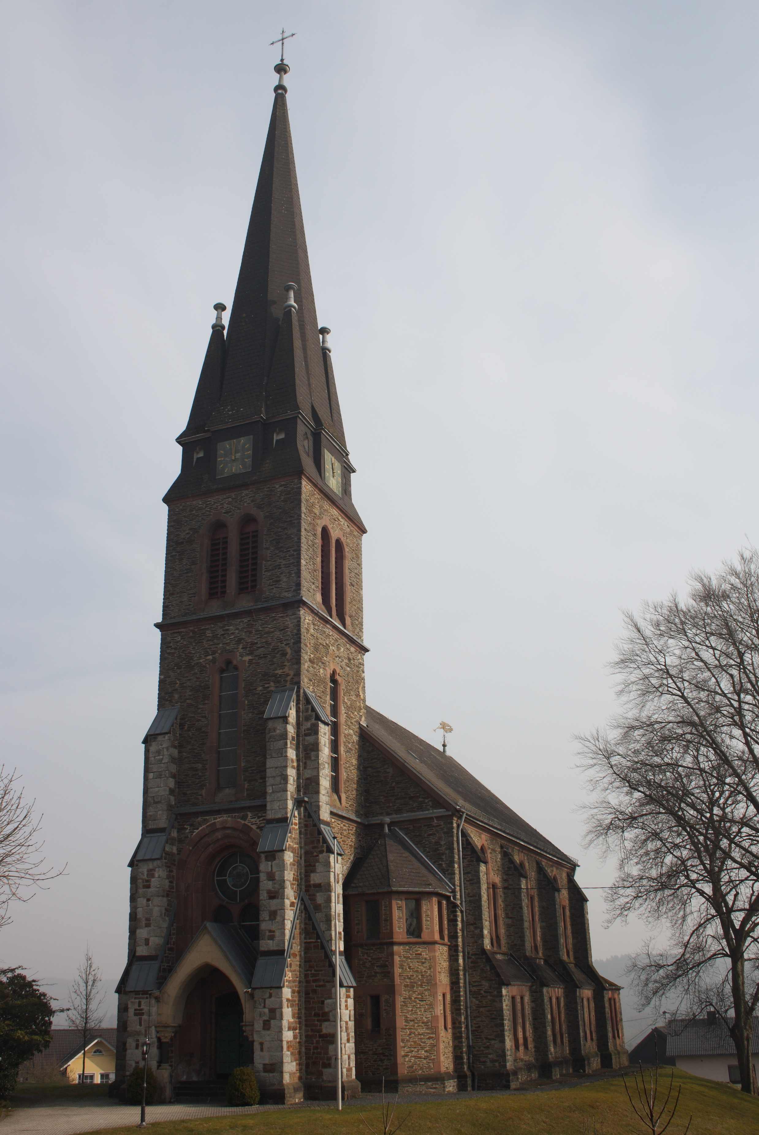 Evangelische Kirche in Puderbach